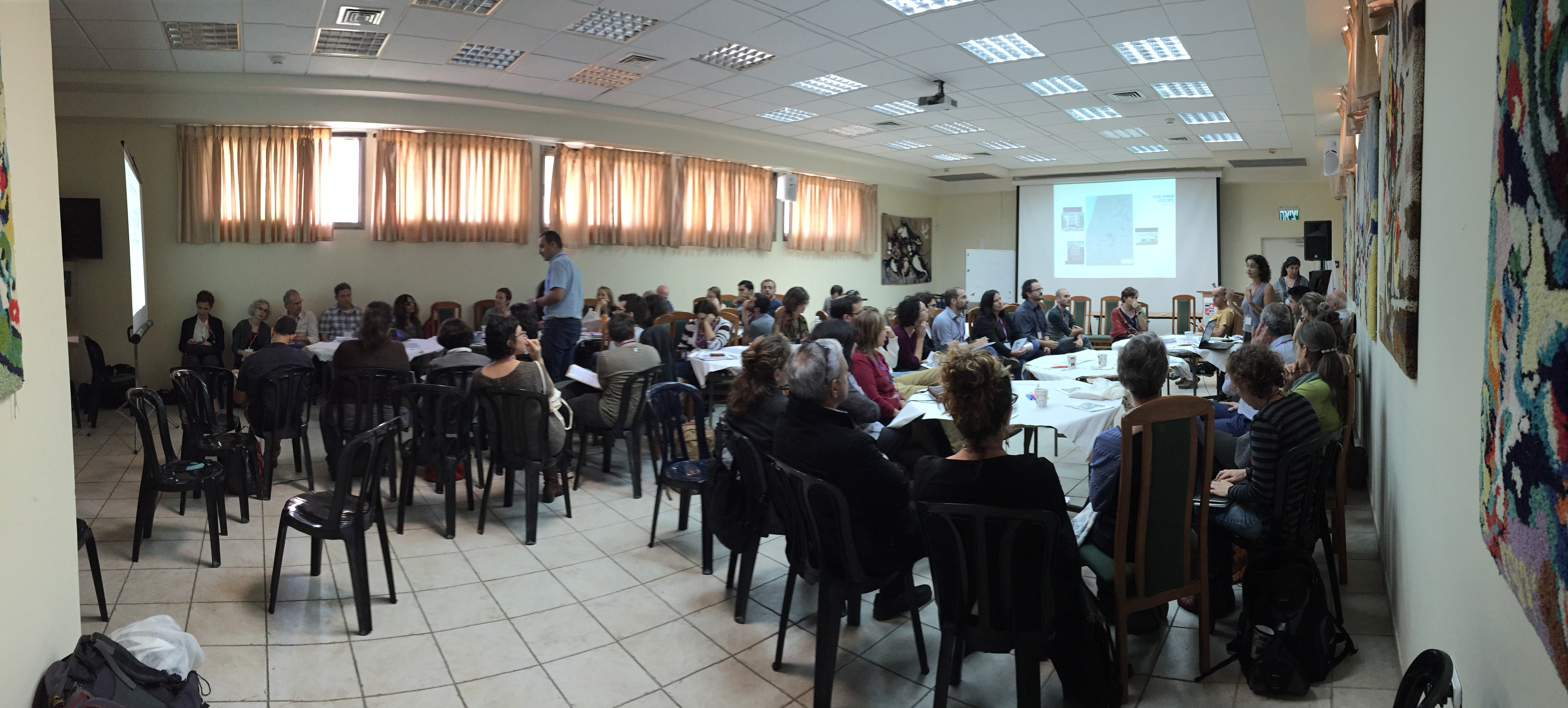 פורום שולחנות עגולים, עכו 2015